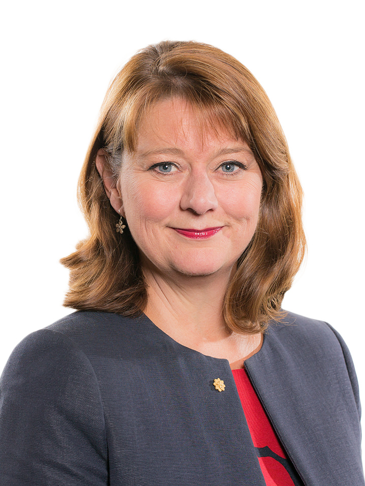 Plaid: Plaid Cymru Etholaeth: Rhondda Party: Plaid Cymru Constituency: Rhondda